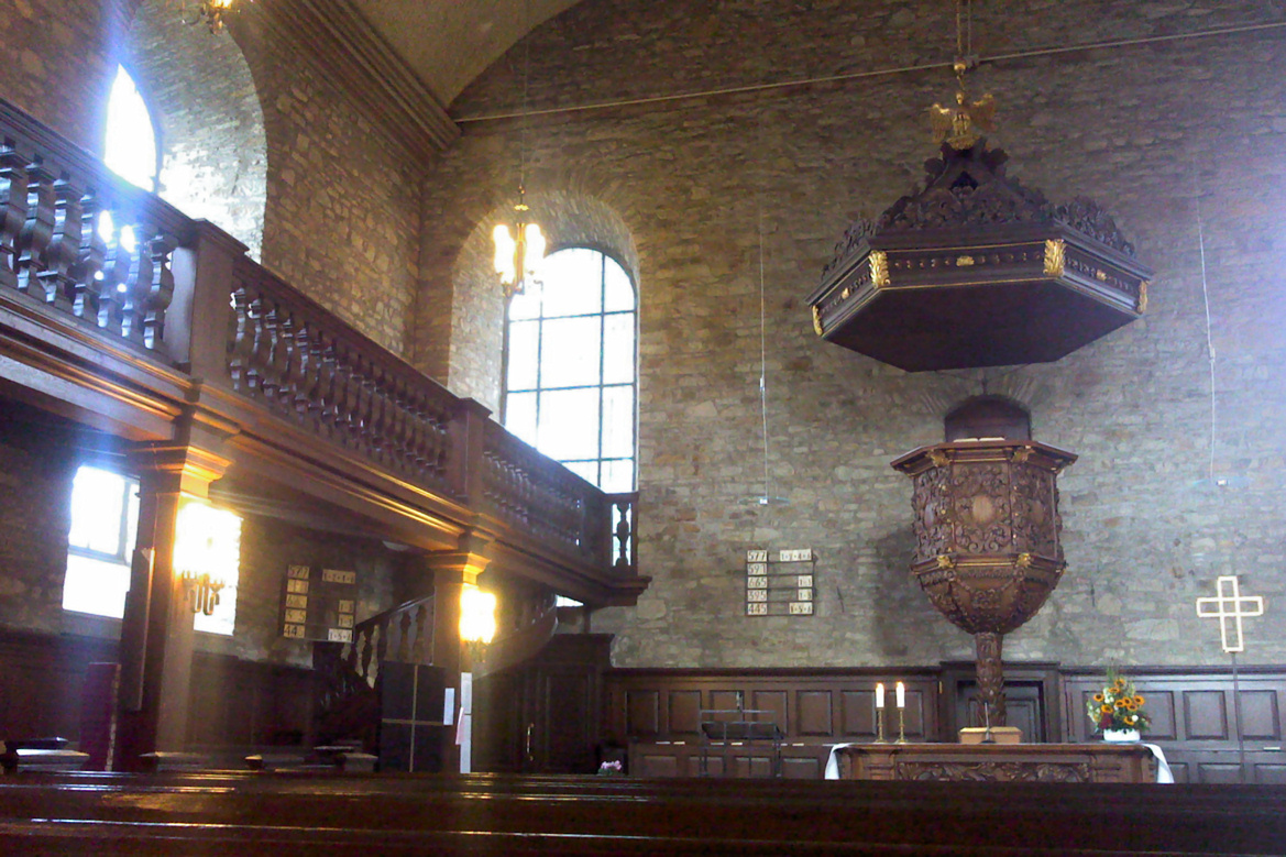 Marktkirche in Essen-Kettwig, Kanzel und Interieur